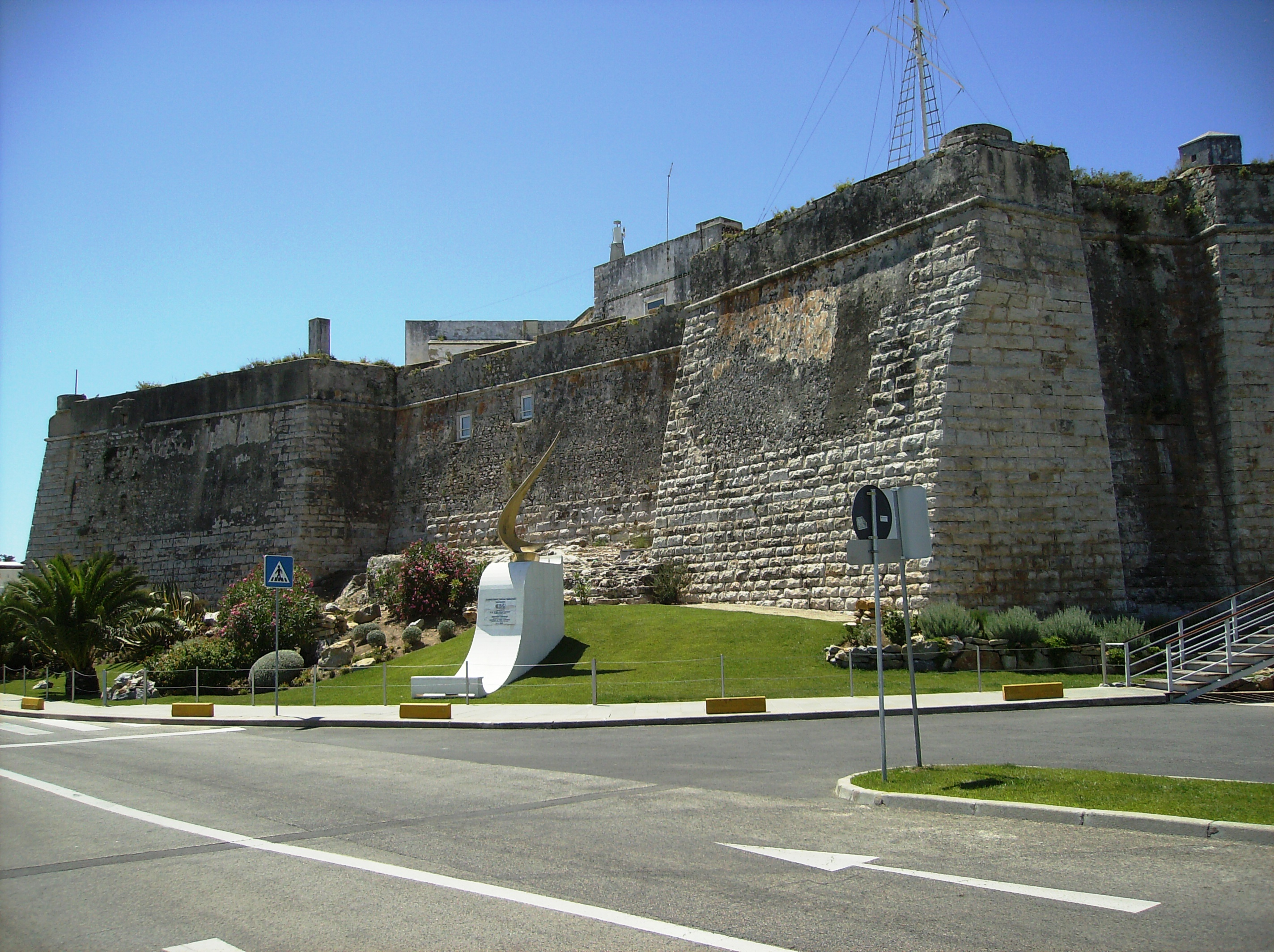 Forte de Nossa Senhora da Luz, Cidadela de Cascais, Cascais, distrito de Lisboa, Portugal.